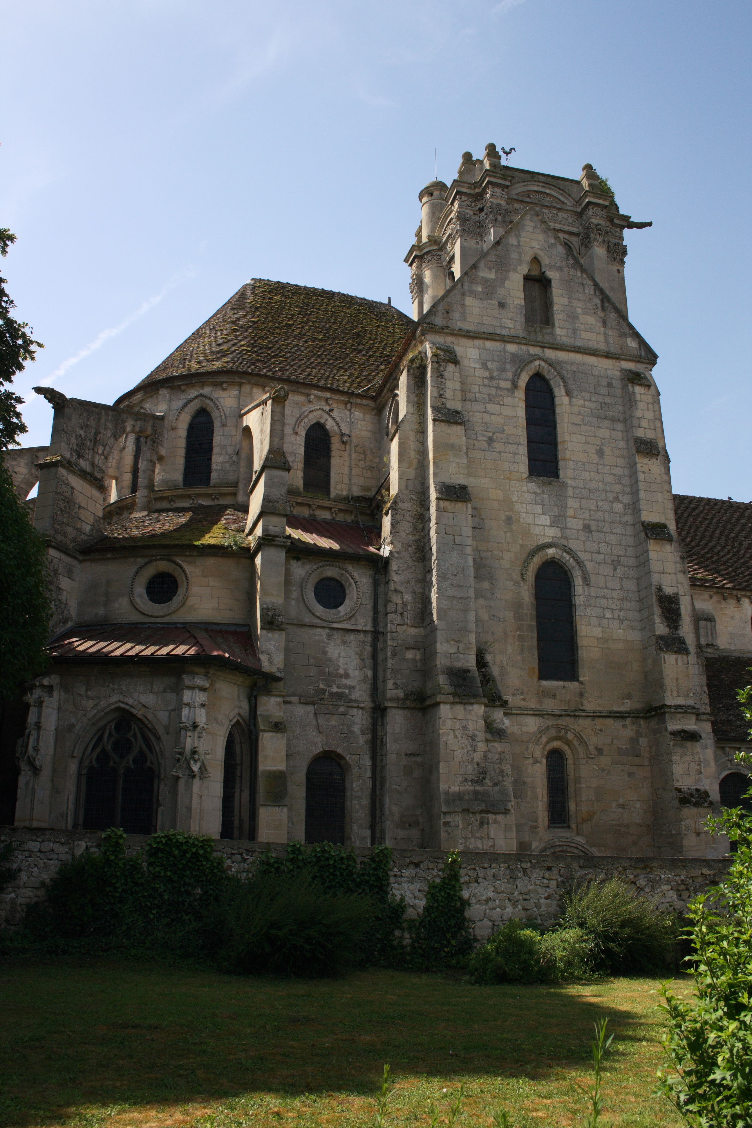 katholische Pfarrkirche Saint-Sulpice in Chars